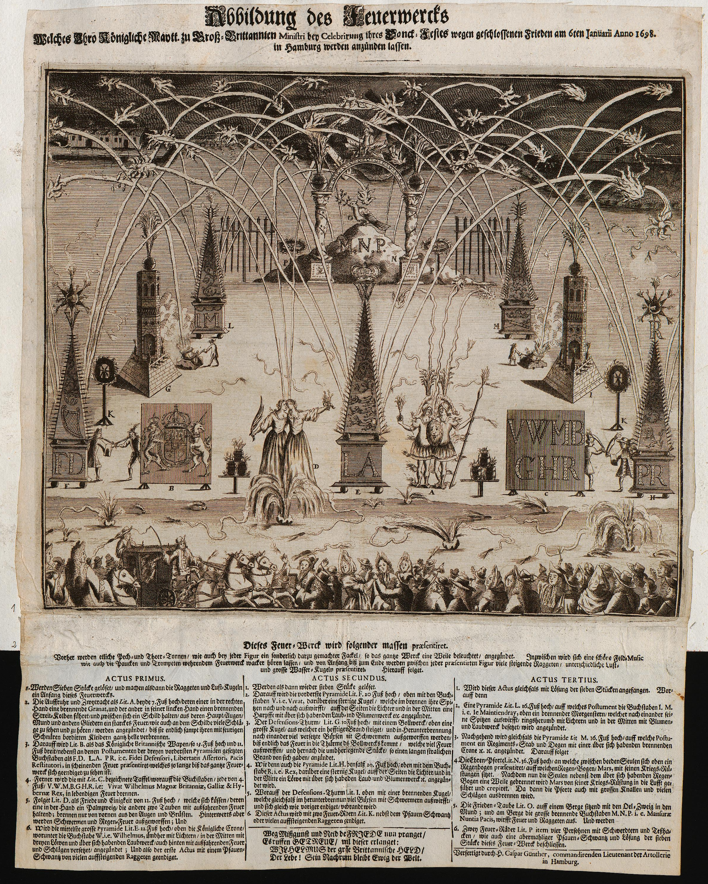 Grafik aus dem Klebeband Nr. 15 der Fürstlich Waldeckschen Hofbibliothek Arolsen Motiv: Feuerwerk des britischen Botschafters in Hamburg am 6. Januar 1698 zur Feier des Friedens von Rijswijk (Oktober 1697) "Abbildung des Feuerwercks Welches Ihro Königliche Maytt. zu Groß-Brittannnien Ministri bey Celebrirung ihres Danck-Festes wegen geschlossenen Frieden am 6ten Januarii Anno 1698 in Hamburg werden anzünden lassen"